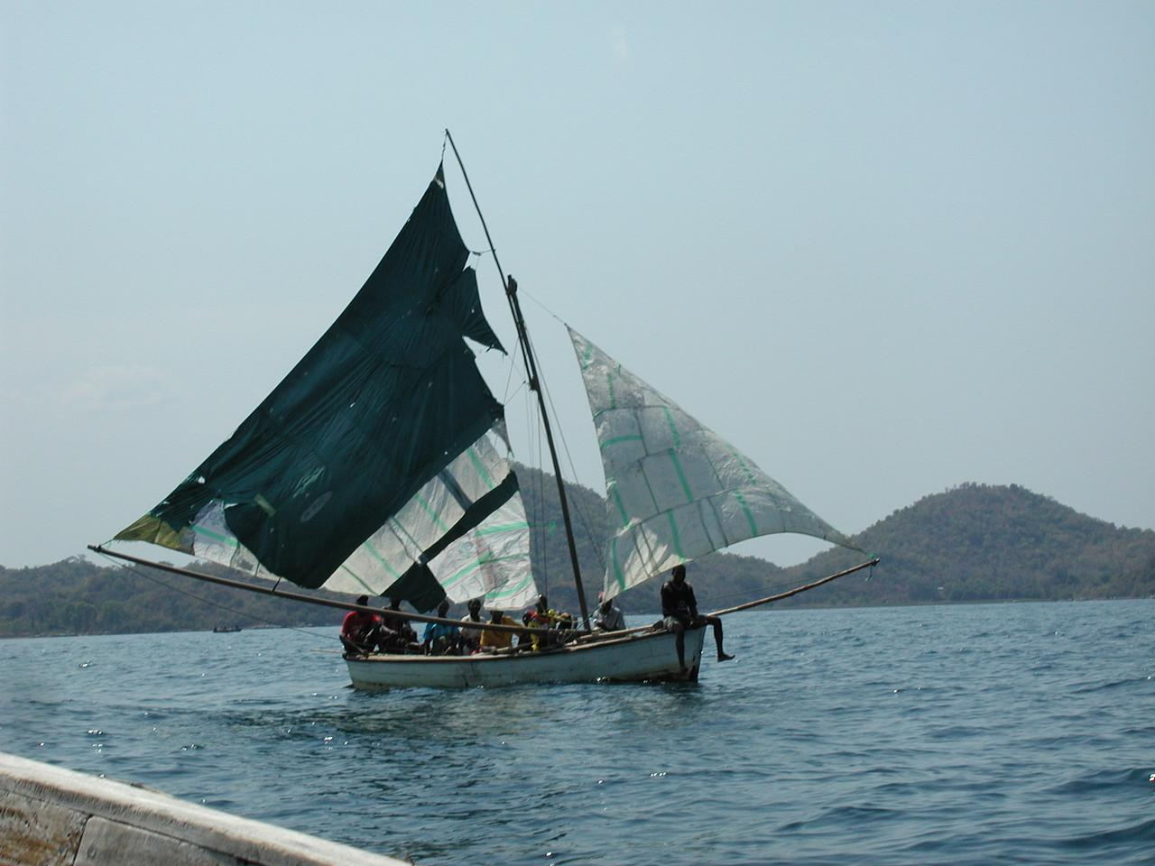 Boat on Lake Malawi, taken from Likoma Island